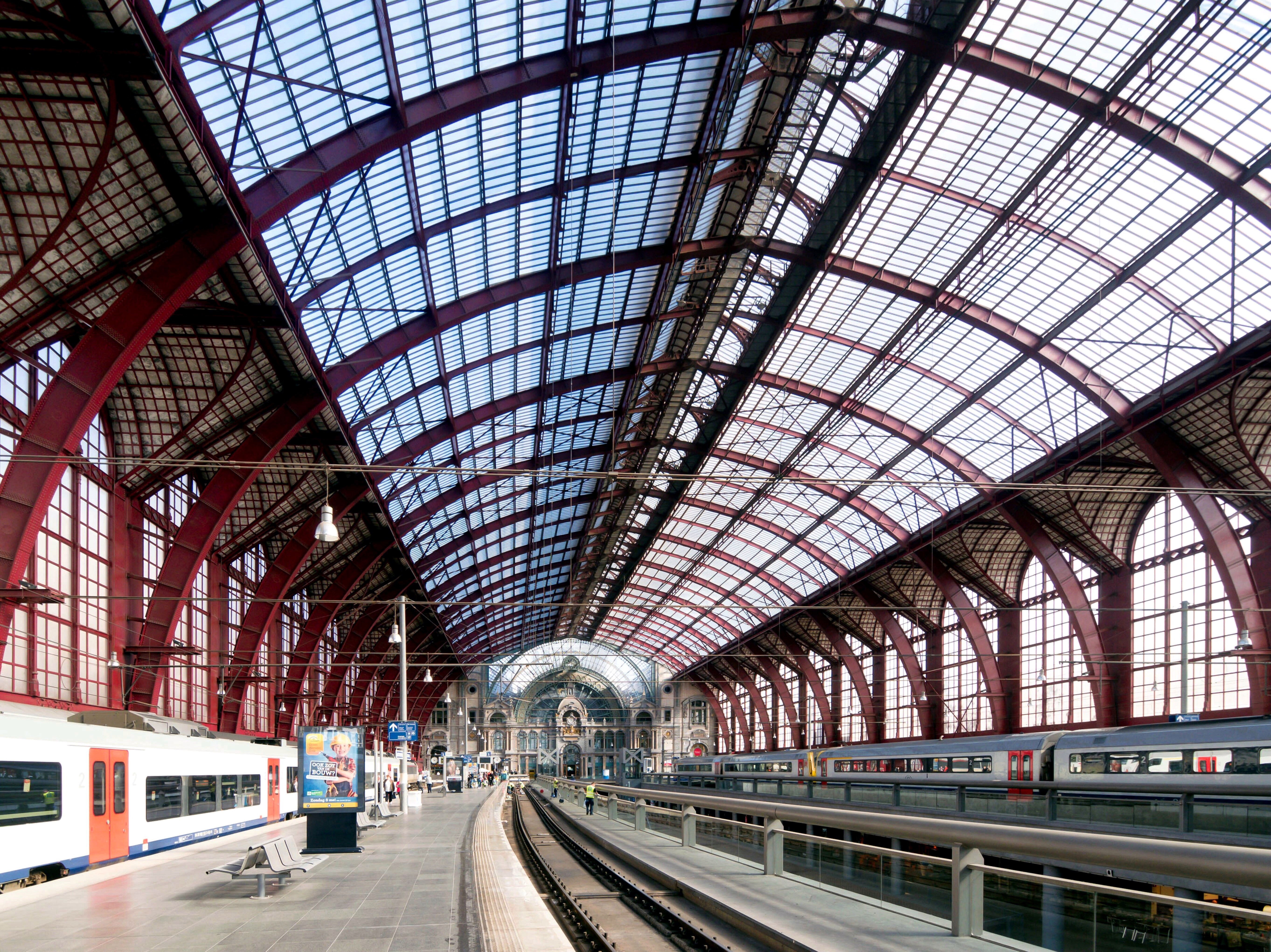 Wegen der Stahlskelettbauweise und der riesigen Verglasungen wird der Antwerpener Zentralbahnhof "Eisenbahnkathedrale" genannt.